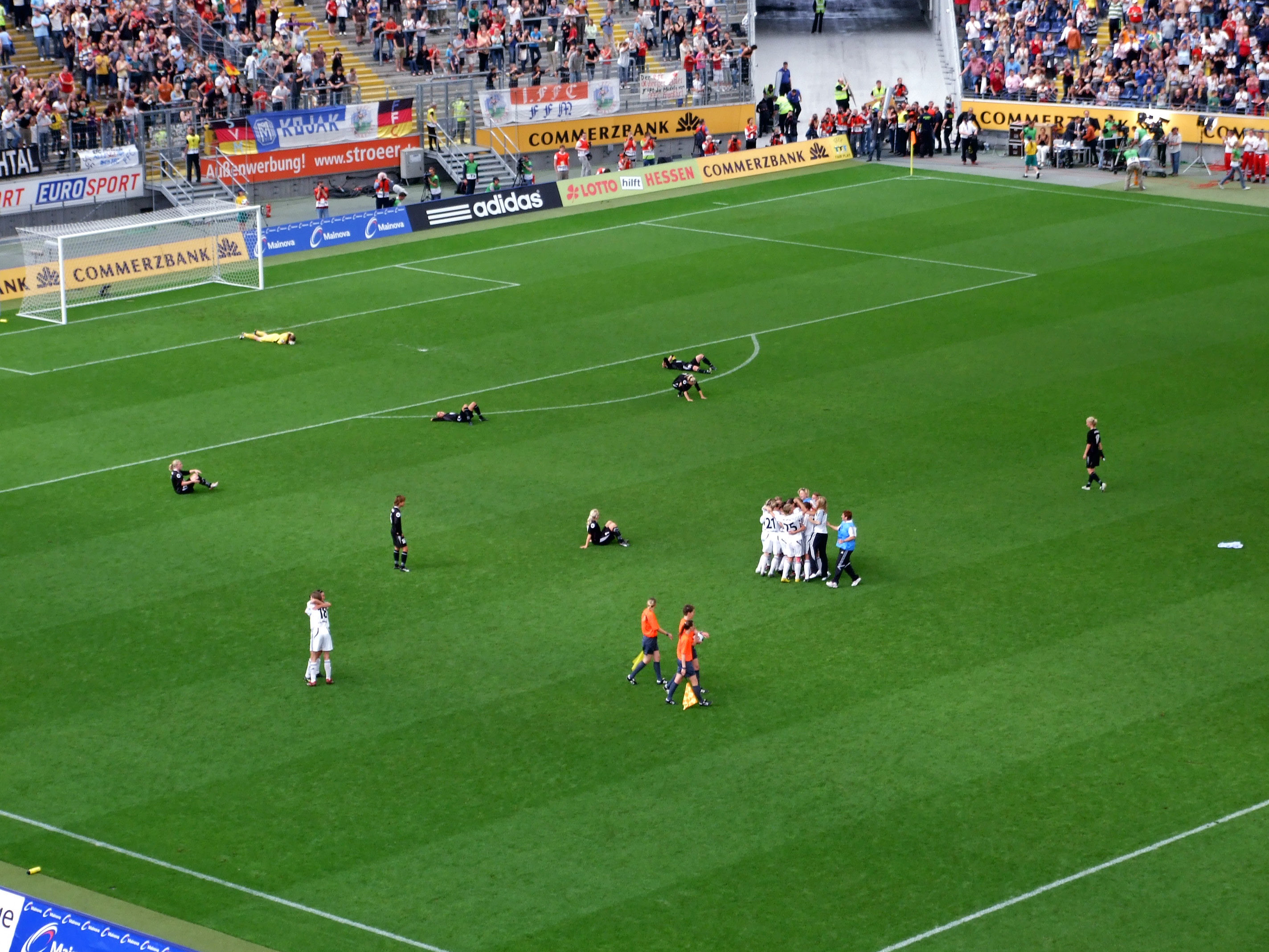 Spielende, 1. FFC gegen Umeå, Commerzbank-Arena bei dem UEFA-Women's-Cup 2007/2008, Finalrückspiel zwischen 1. FFC Frankfurt und Umeå IK damfotboll